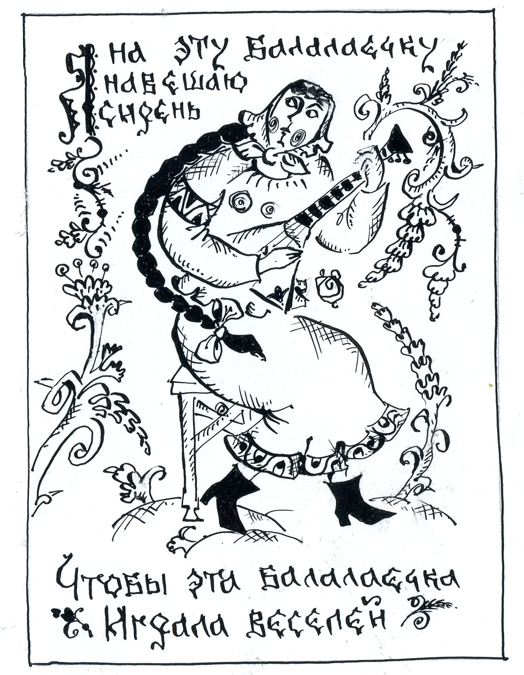 Графика. Из серии рисунков на темы частушек